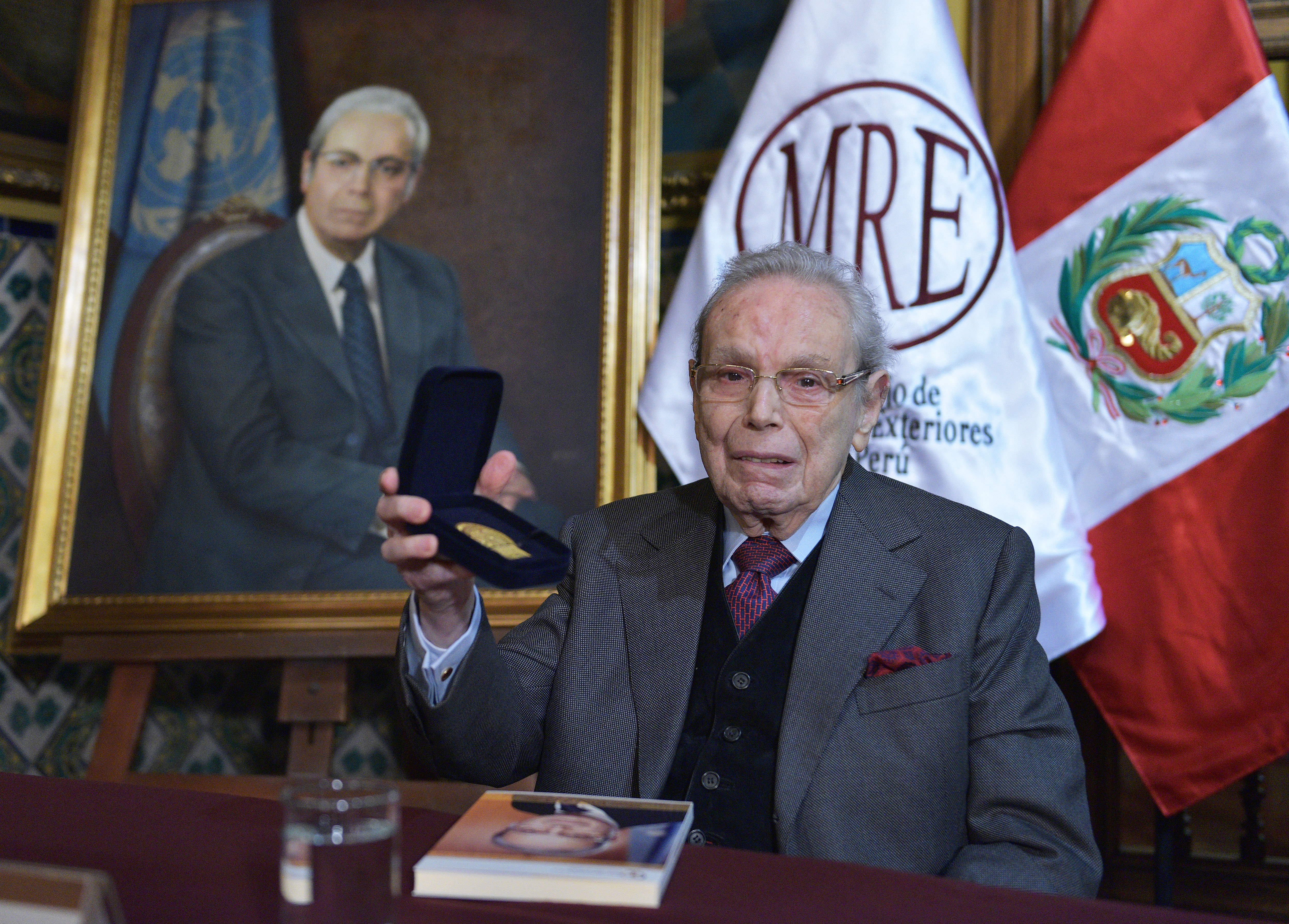 La Ministra de Relaciones Exteriores, Embajadora Ana María Sánchez y el Director de la Academia Diplomática del Perú (ADP), Embajador Allan Wagner, presentaron el libro “Javier Pérez de Cuéllar: un peruano al servicio de la paz mundial”, que es el resultado de una tesis sustentada por el magister Jorge de Vinatea Ríos, con la que obtuvo el grado de máster en Historia en la Universidad La Sorbona de París. El libro versa sobre el mandato del Secretario General Javier Pérez de Cuéllar como quinto Secretario General de las Naciones Unidas entre enero de 1982 y diciembre de 1991. La Academia Diplomática del Perú lleva el nombre de tan ilustre diplomático peruano.